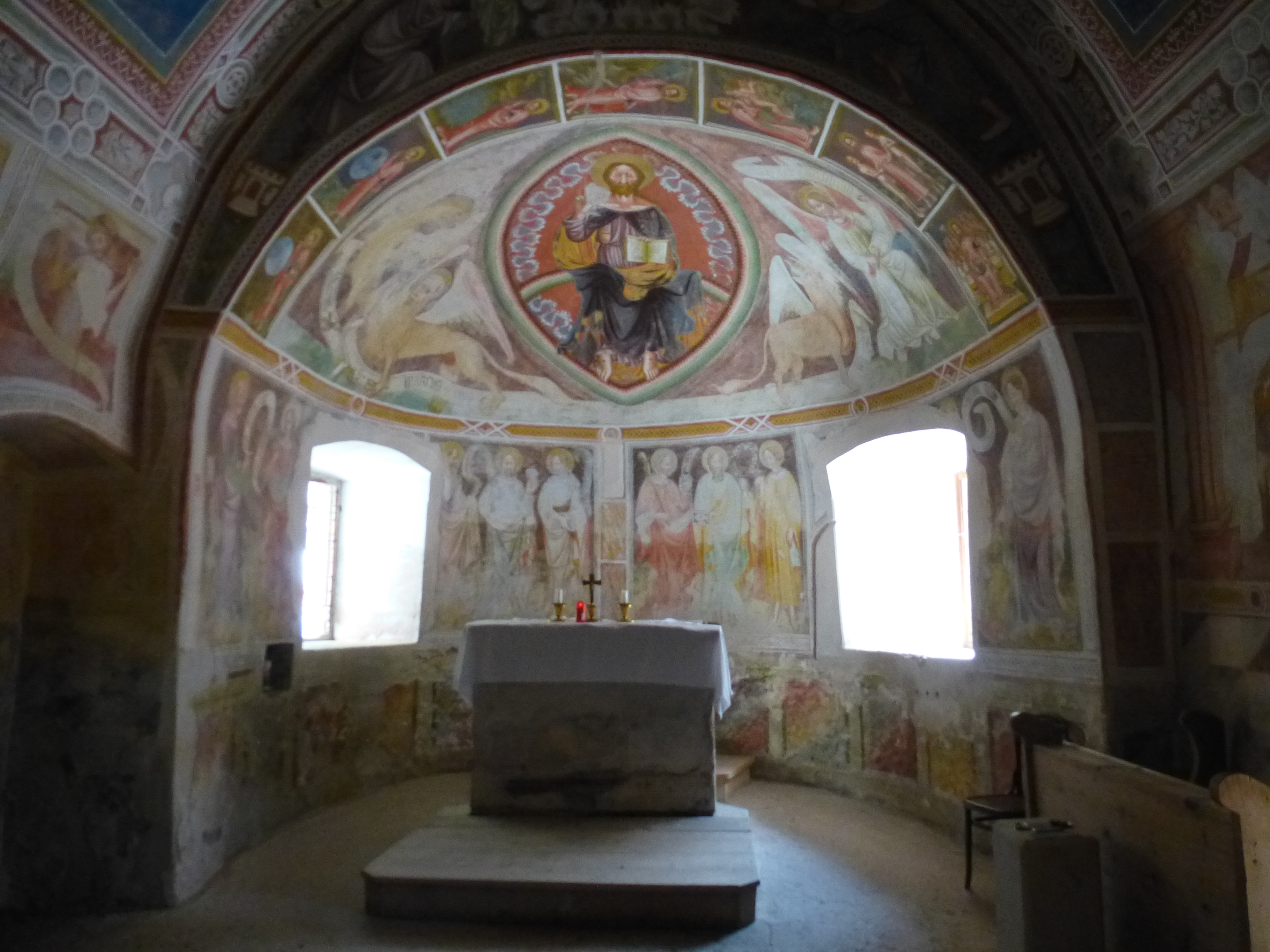 St. Helena in Deutschnofen: gotische Fresken in der Rundapsis